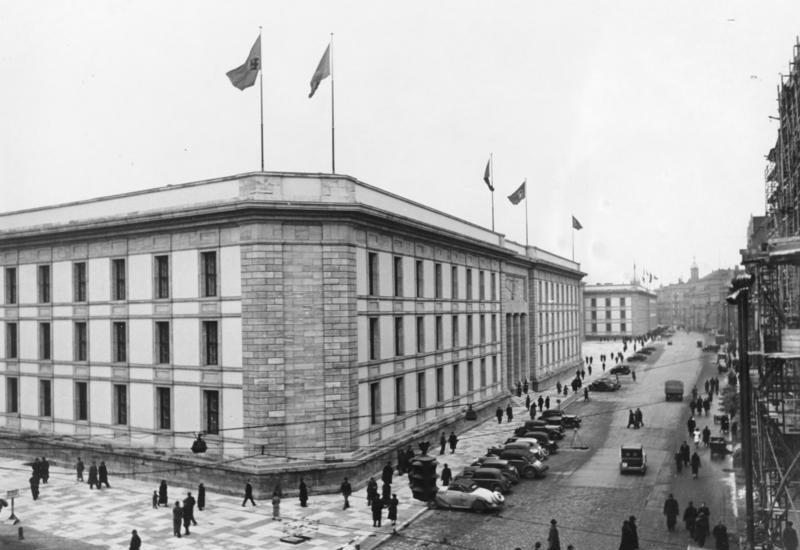 Die Reichskanzlei in der Voßstrasse in Berlin Erwerb d. Fotos: 10.1.1939